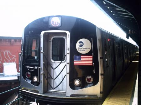 Tren M del servicio del Metro de Nueva York